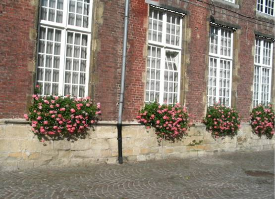 De roede van Aalst bevindt zich op de binnenkoer van het stadhuis van Aalst (onder de geraniums)